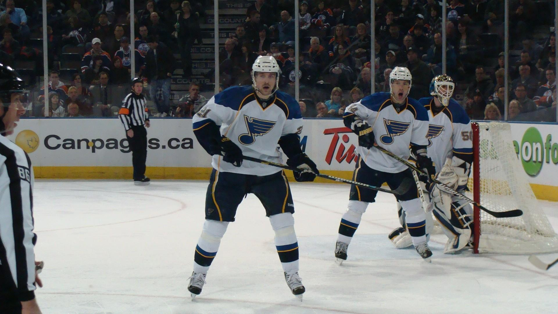 St. Louis Blues